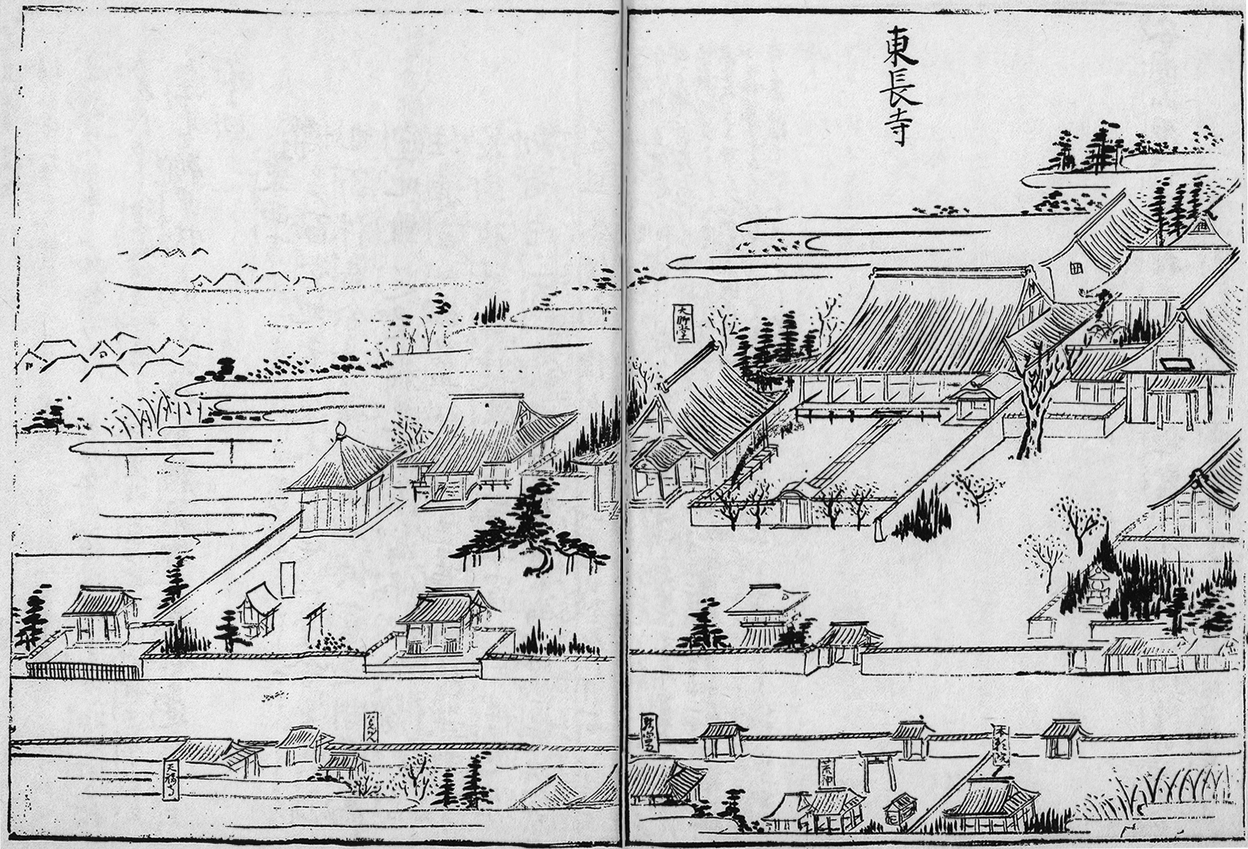 Der Tōchō-Tempel (Hakata) zu Beginn des 19. Jhs